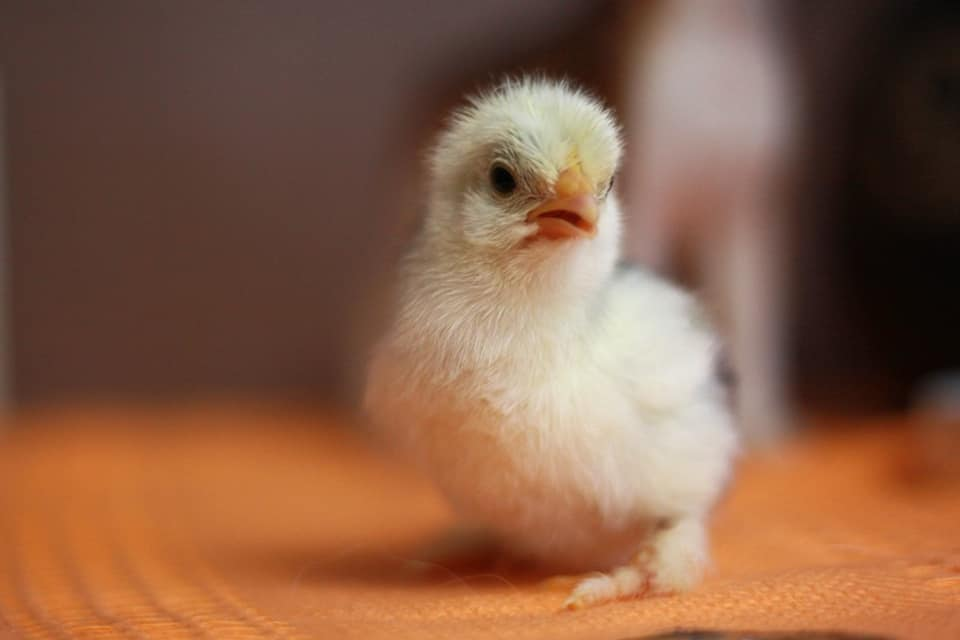 добові карликові кохінхіни Lesya Tkachenko